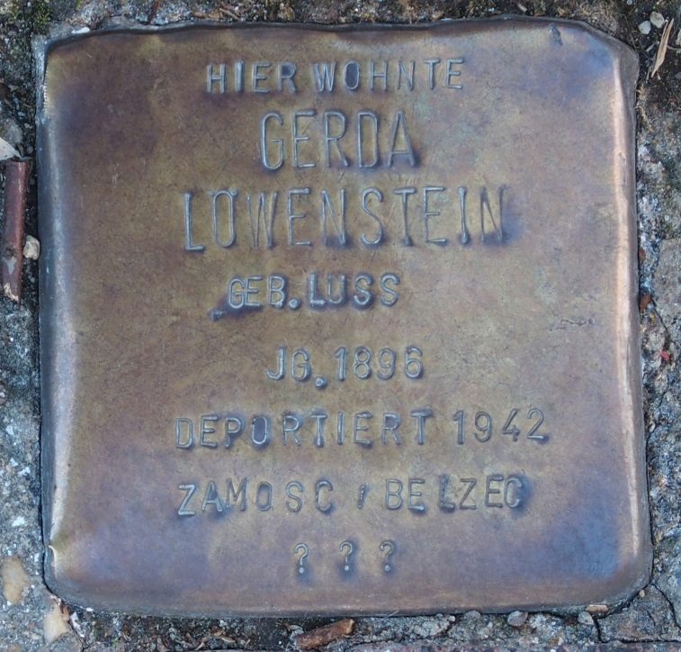 Stolperstein in Soest Auf der Borg 13, Gerda Löwenstein